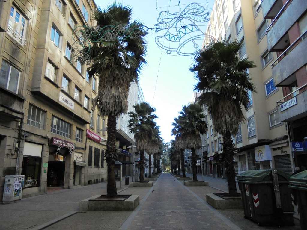 Calle Gutiérrez Mellado en Pontevedra Capital